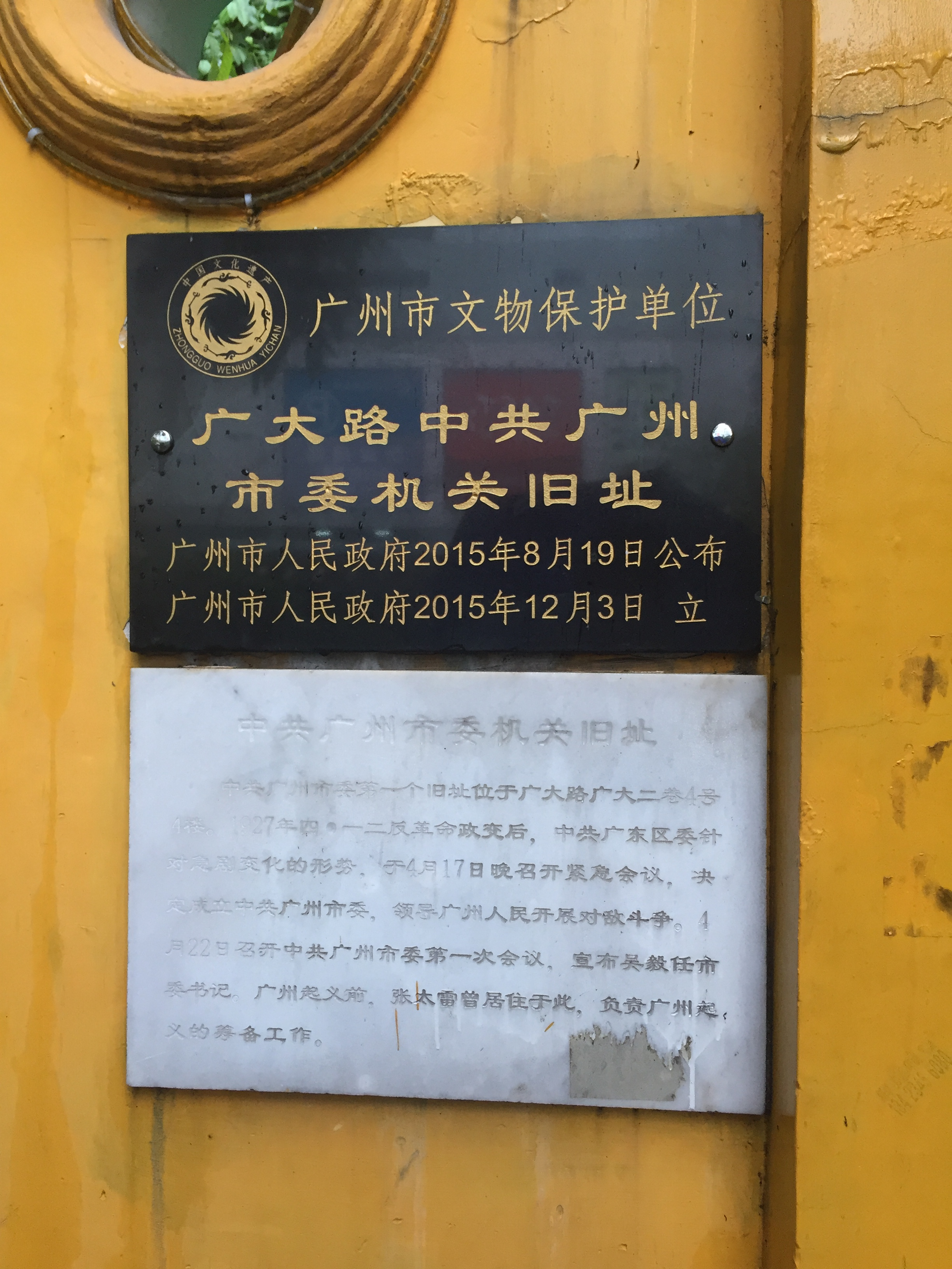 位于广东省广州市越秀区广大路广大二巷4号旁黄色外墙上。